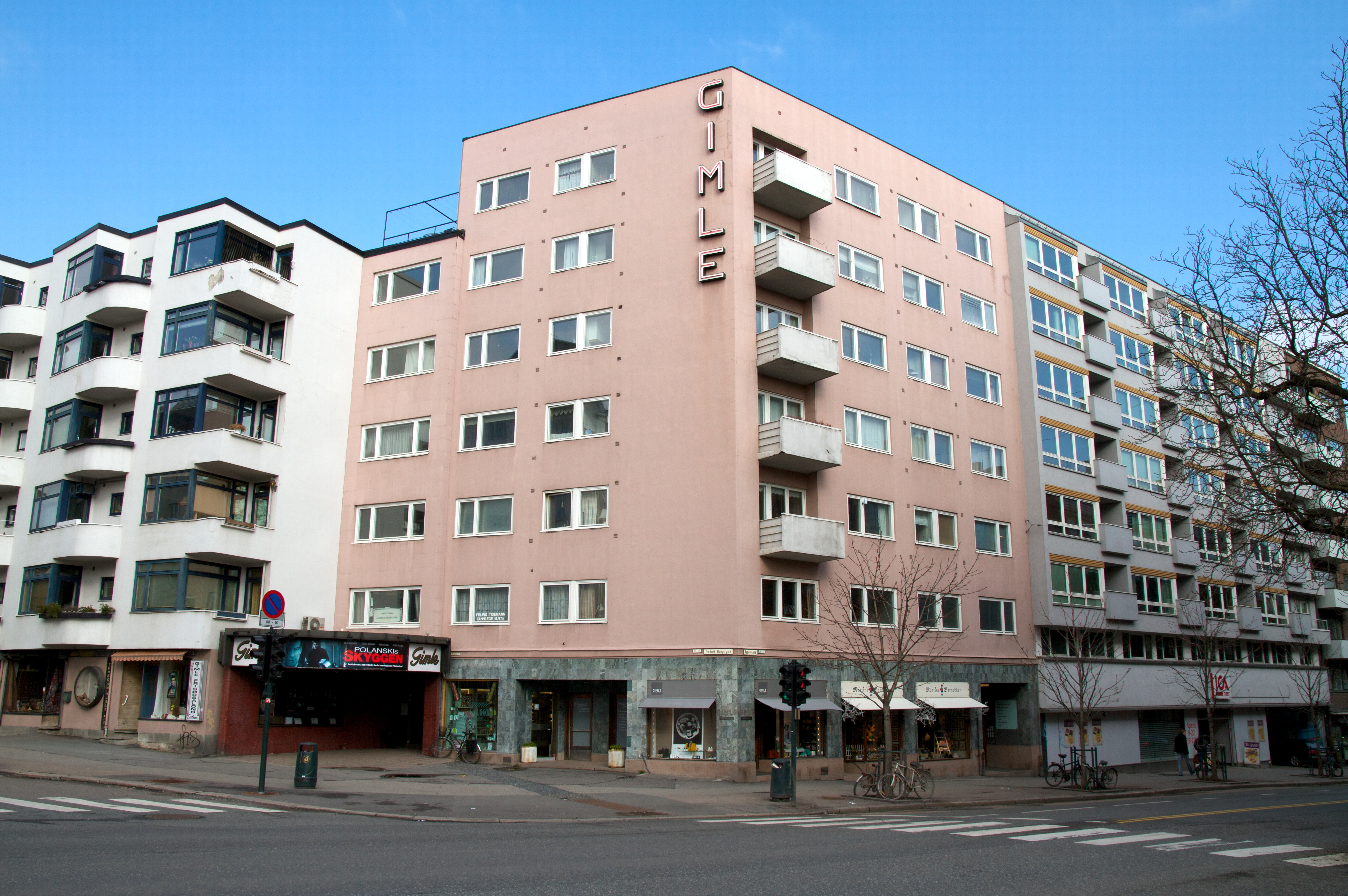 Gimle kino. Bygdøy allé 39. Frogner i Oslo.